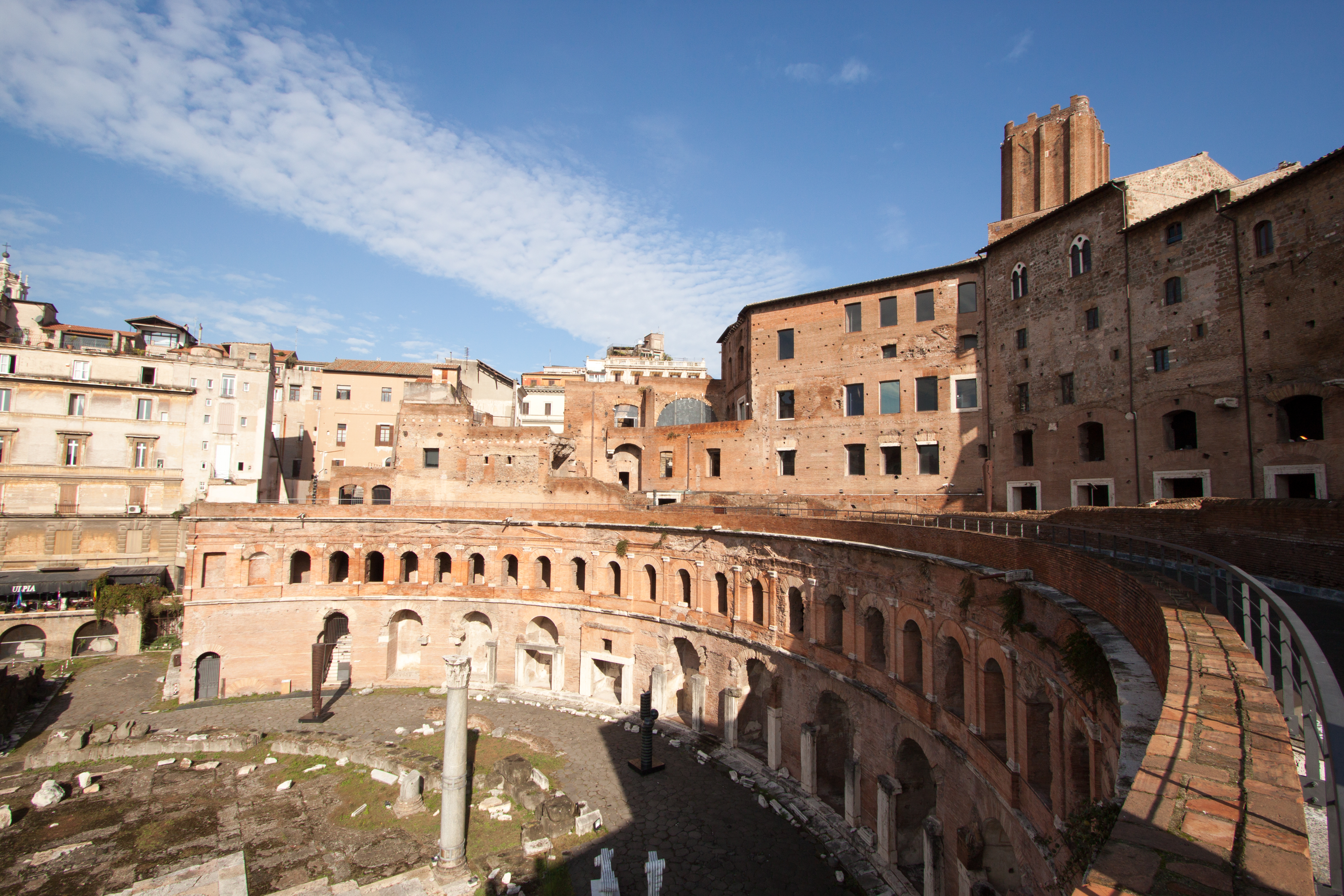 Mercato di Traiano